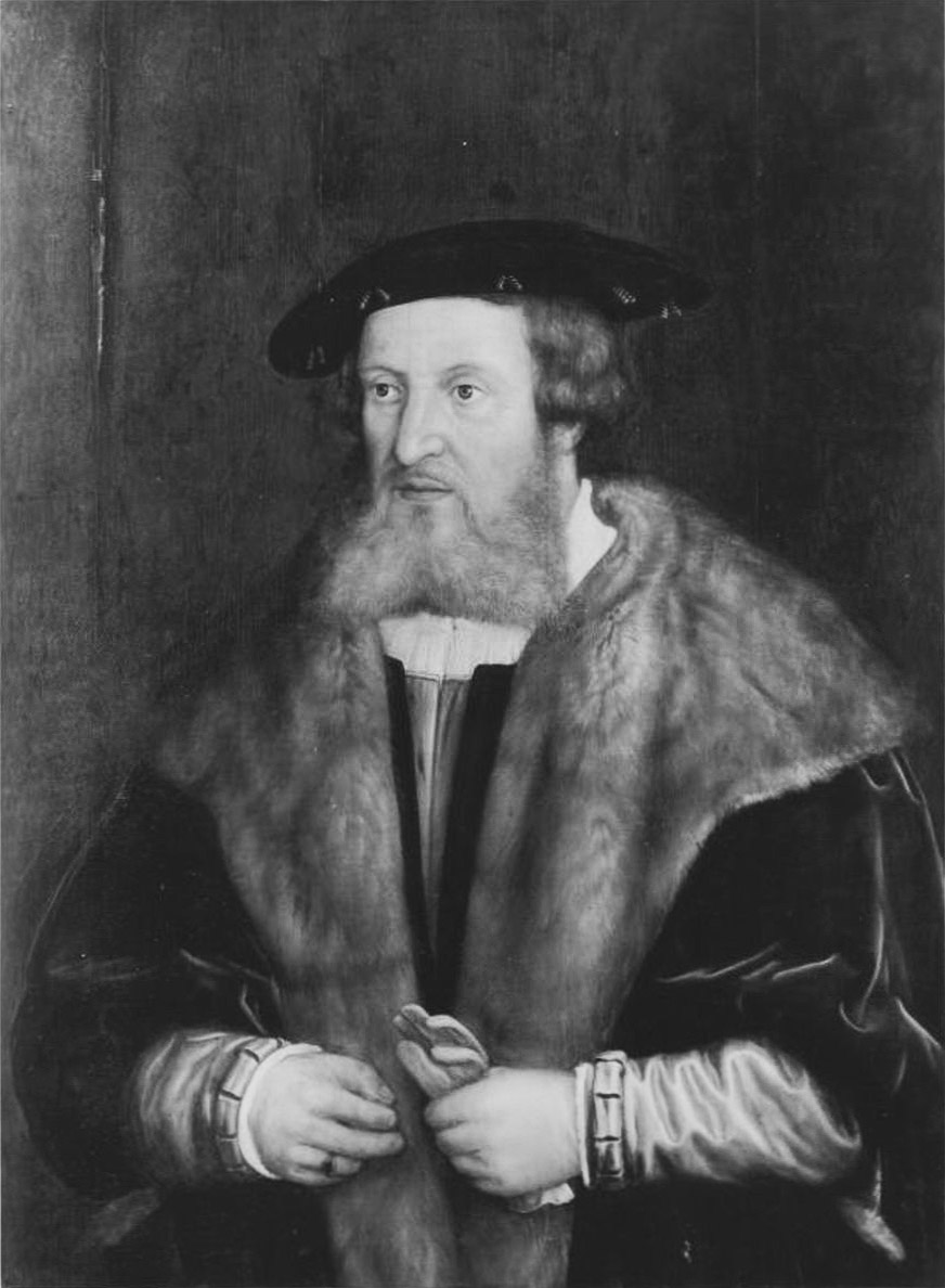 Friedrich II. d. Weise, Bruder Ludwigs V., geboren 1482-1556, Sohn des Philipp von der Pfalz; nach einer Vorlage wahrscheinlich von Peter Gertner